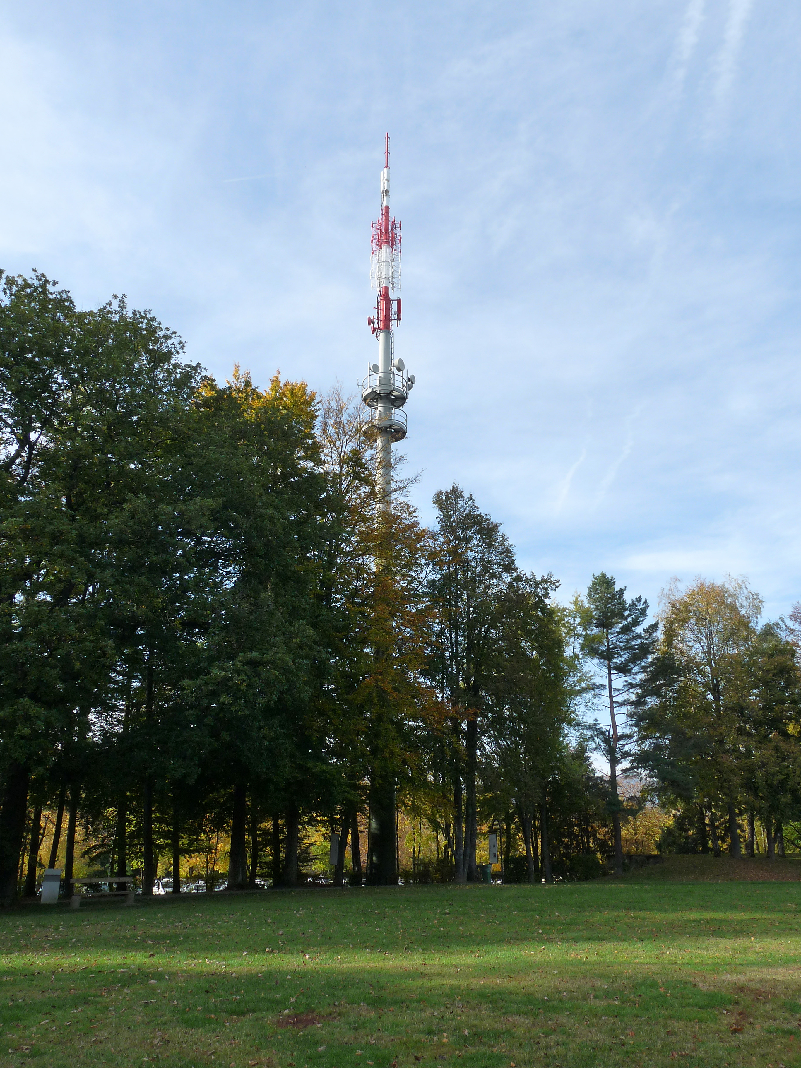 Emetteur du Signal de Bougy (canton de Vaud, Suisse)